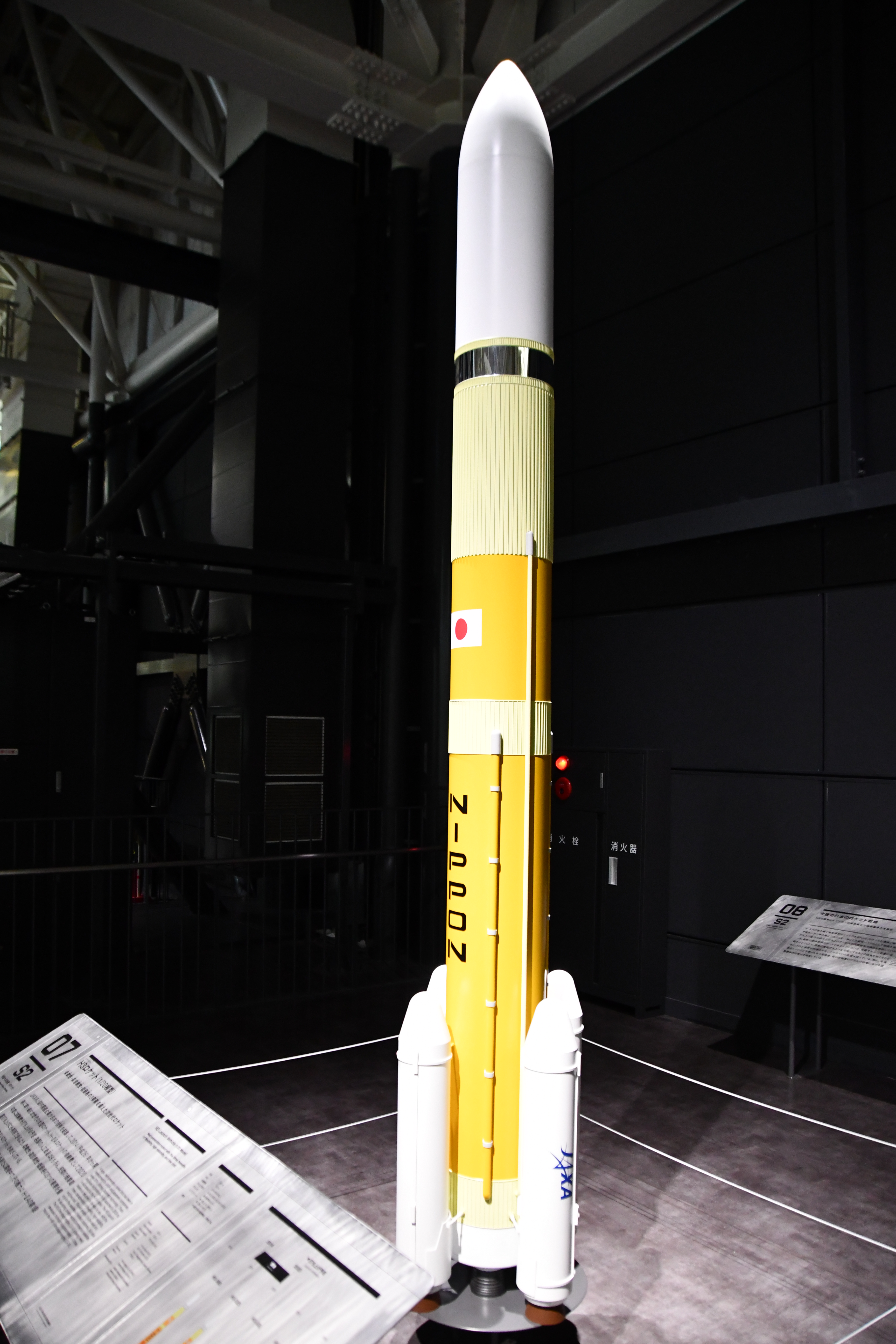 H3ロケット 1/20縮尺模型。2019年11月8日 かかみがはら航空宇宙科学博物館内にて。